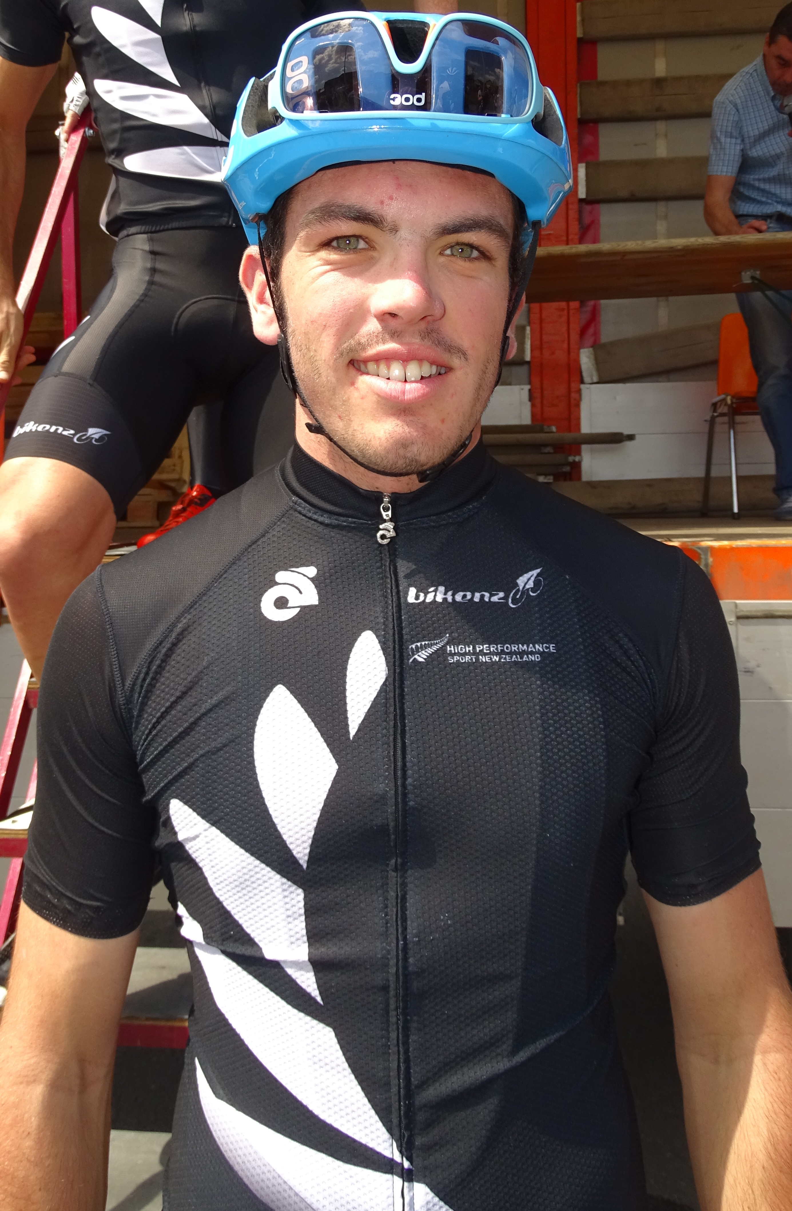 Reportage réalisé le dimanche 7 juin à l'occasion du départ du Mémorial Philippe Van Coningsloo 2015 à Wavre, Belgique.